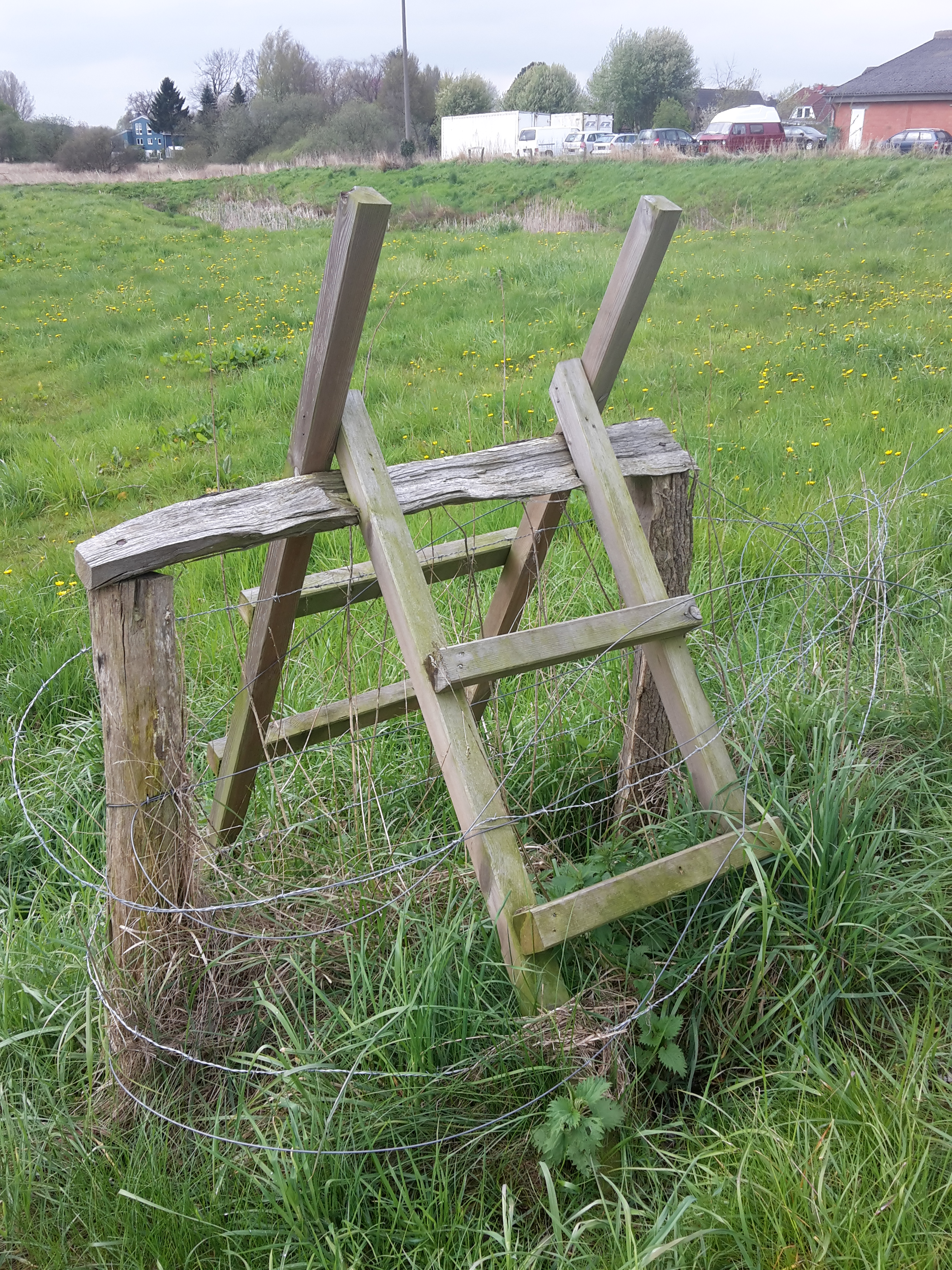 Hölzener Stegel an der Bünzau in Aukrug